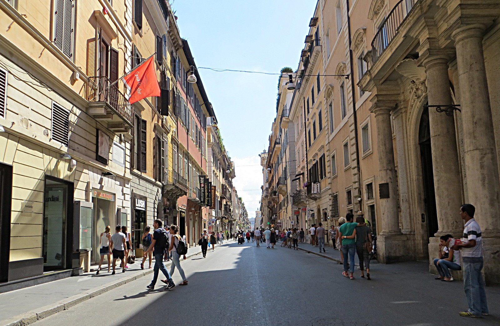 Via del Corso